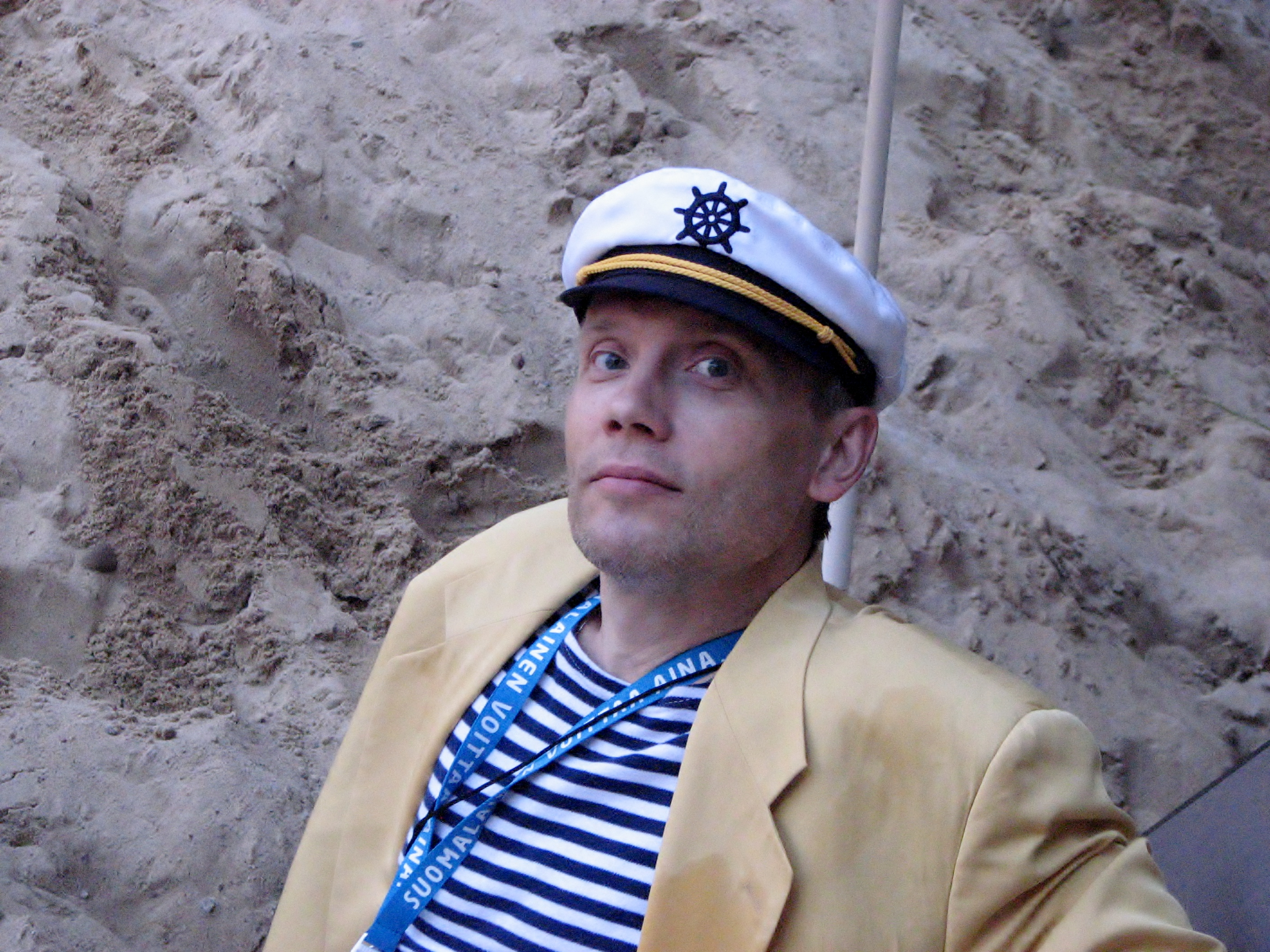 Rain Simmul Tallinna Linnateatri 48. hooaja avamisel